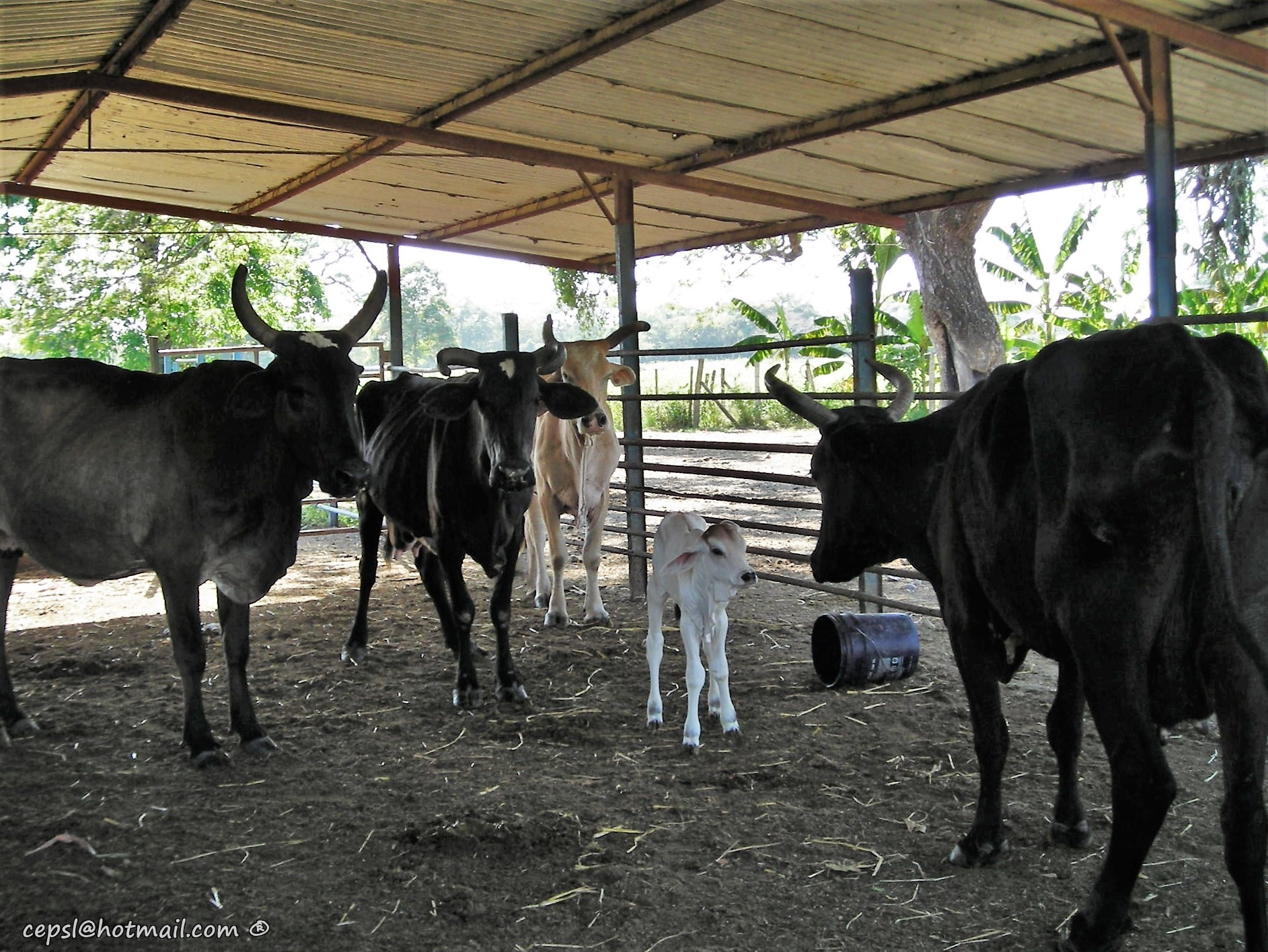 La ganadería es unas de las principales actividades del LLano Venezolano